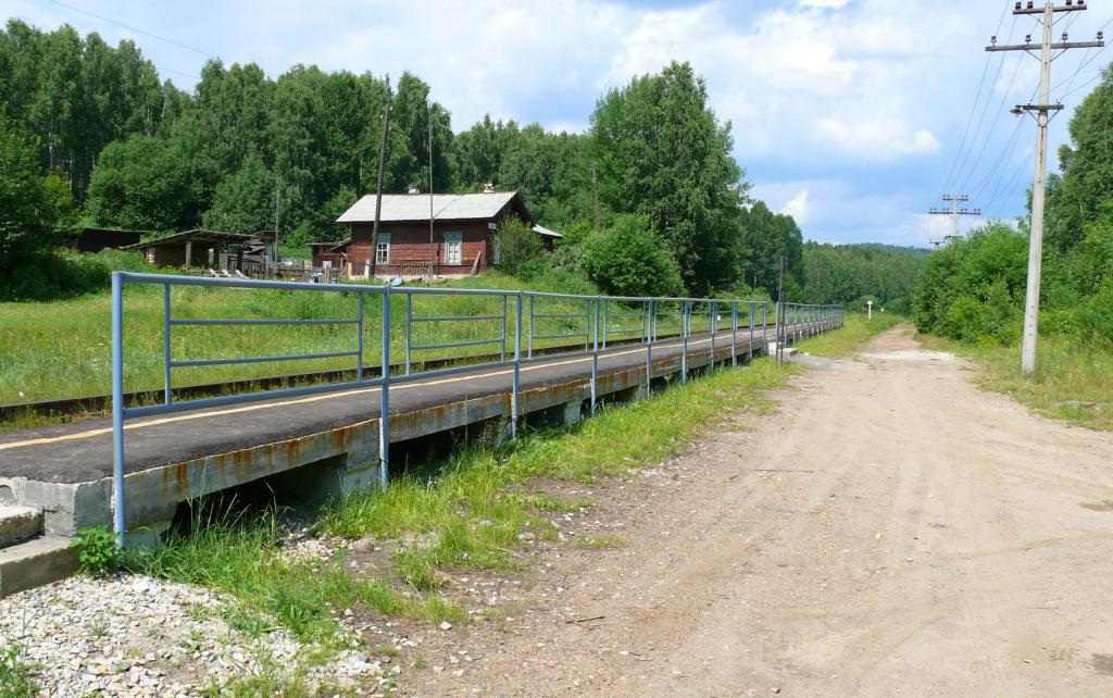 Станция Тюбук в посёлке Южная Кузнечиха